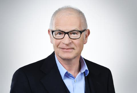 Roland Dähler, Landammann, Appenzell